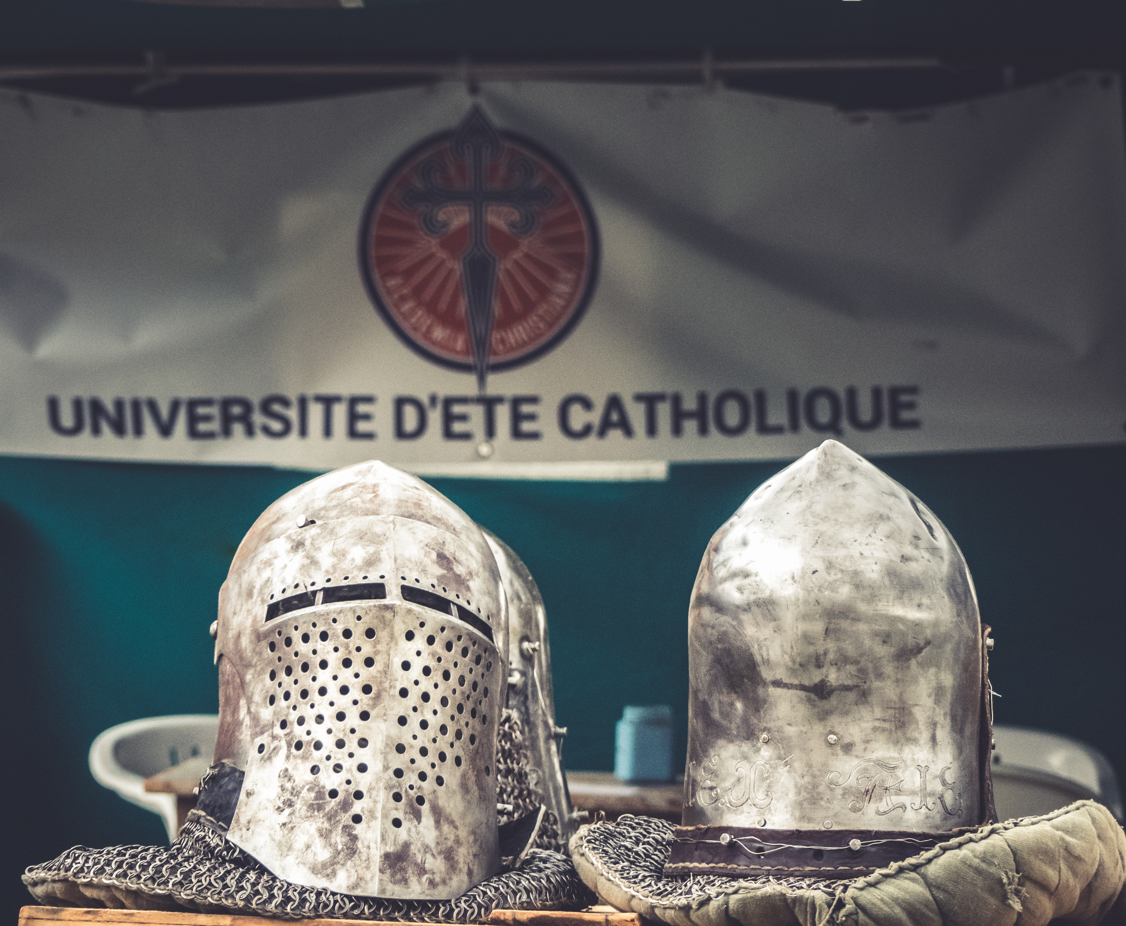 Béhourd - Casques